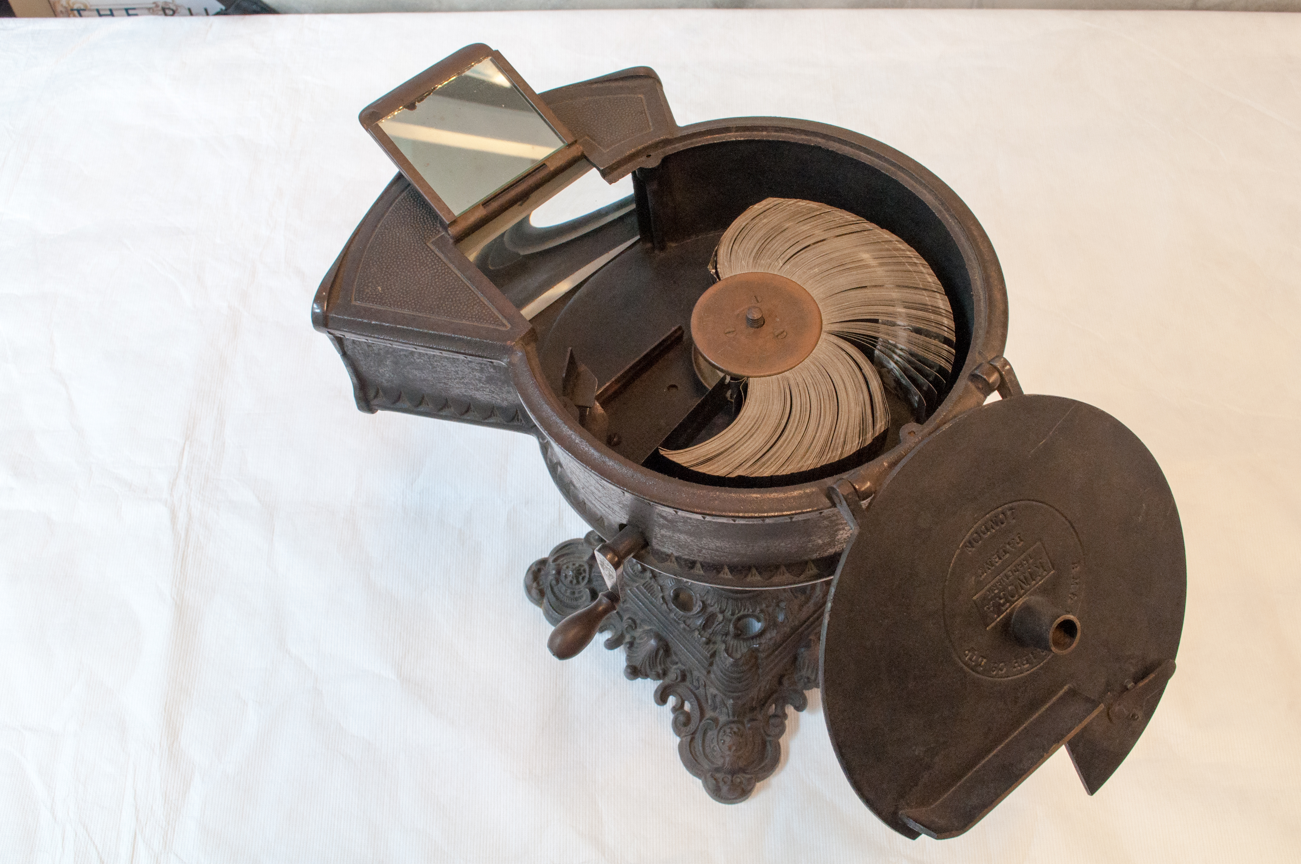 Flipboekkijker This is a file created at the museum: FOMU Photo Museum in Antwerp